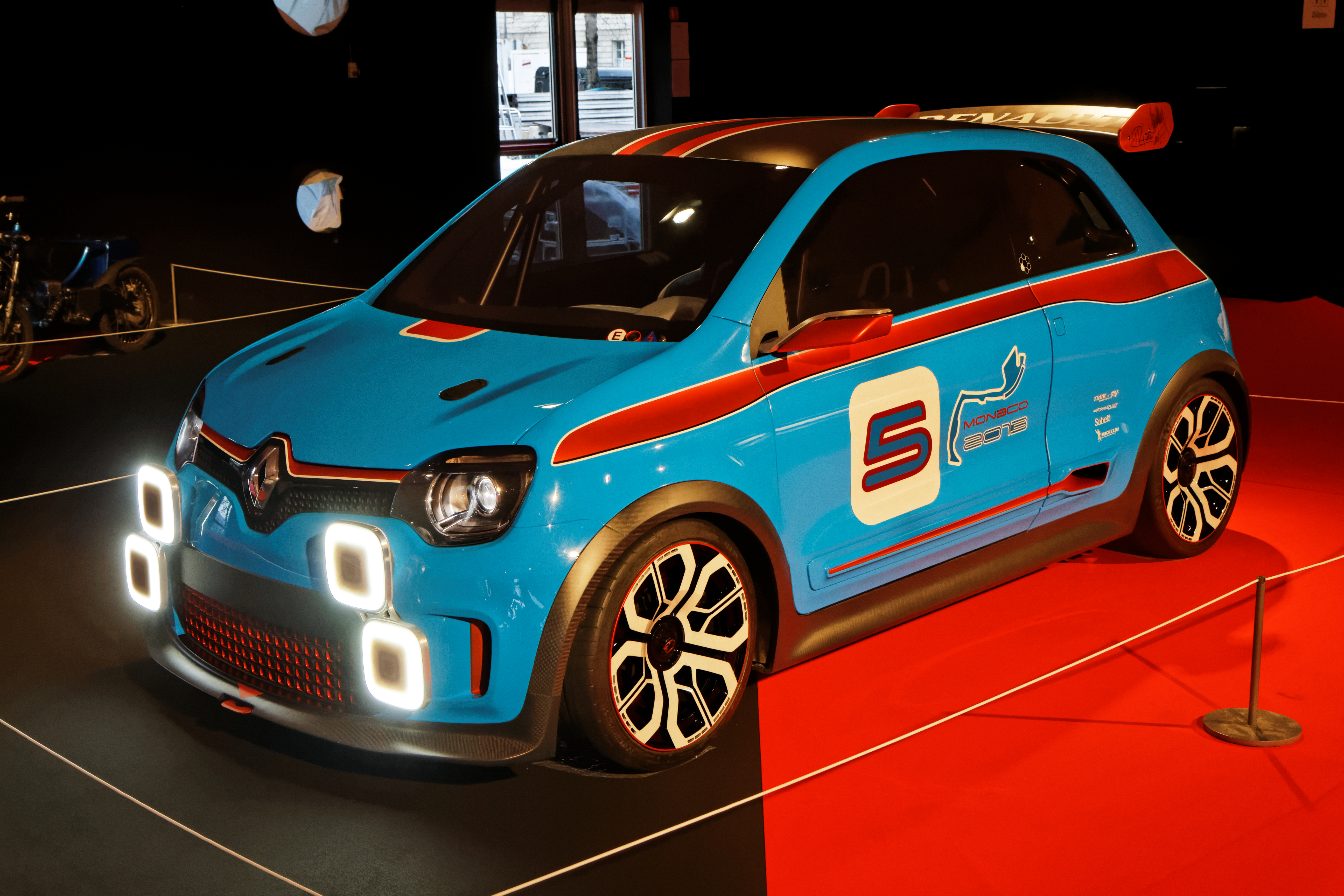 La Renault Twin'Run exposée lors du festival automobile international 2014.